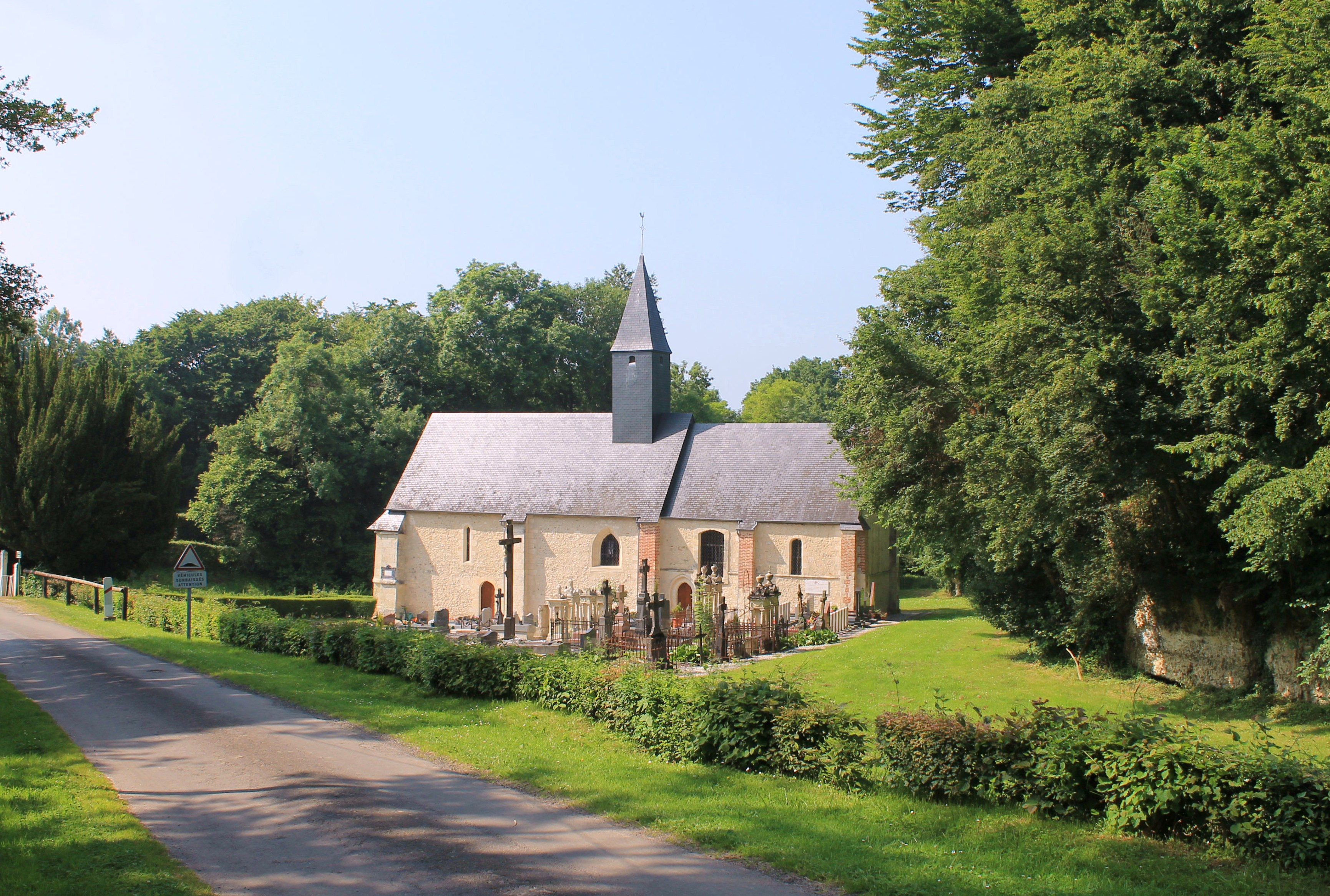 Église Saint-Vaast à Saint-Vaast-en-Auge (Calvados)